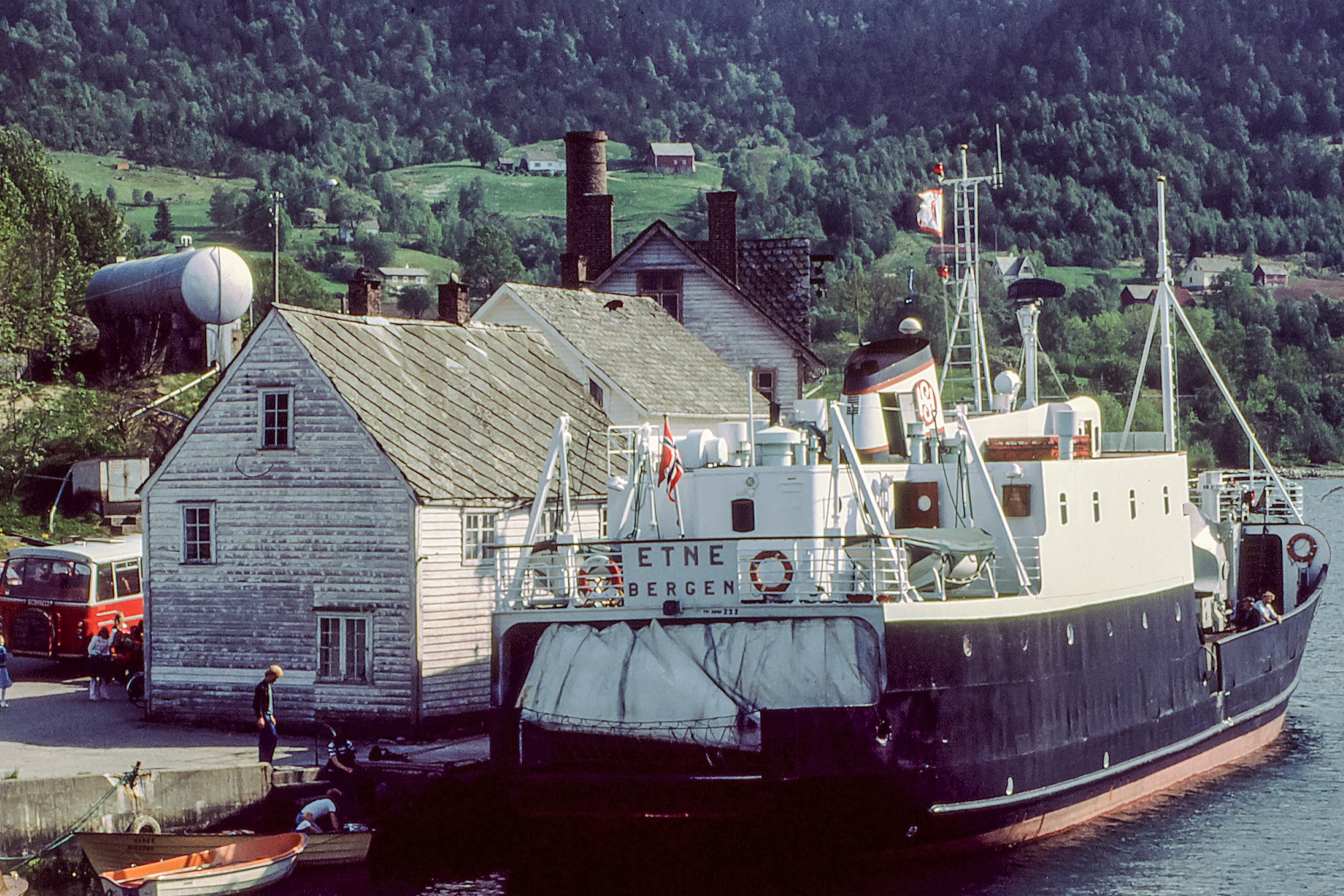 MS Etne ved kai i Herøysund, Kvinnherad i 1981. Foto Harald Sætre